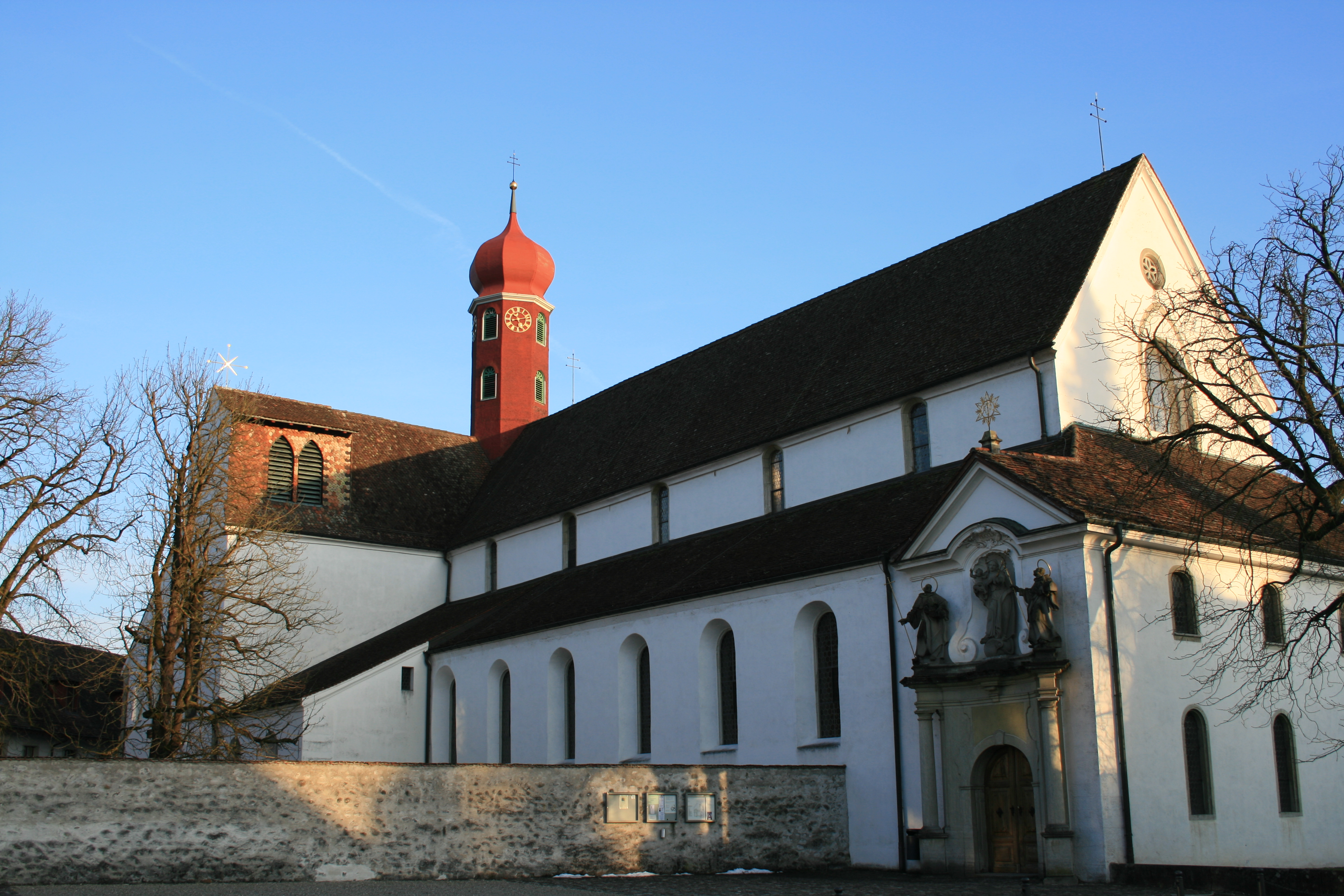 Klosterkirche Wettingen